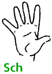 Die Buchstabenkombination 'SCH' im deutschen Fingeralphabet, entsprechend einer Infokarte des Landesverbandes Bayern der Gehörlosen e.V. (